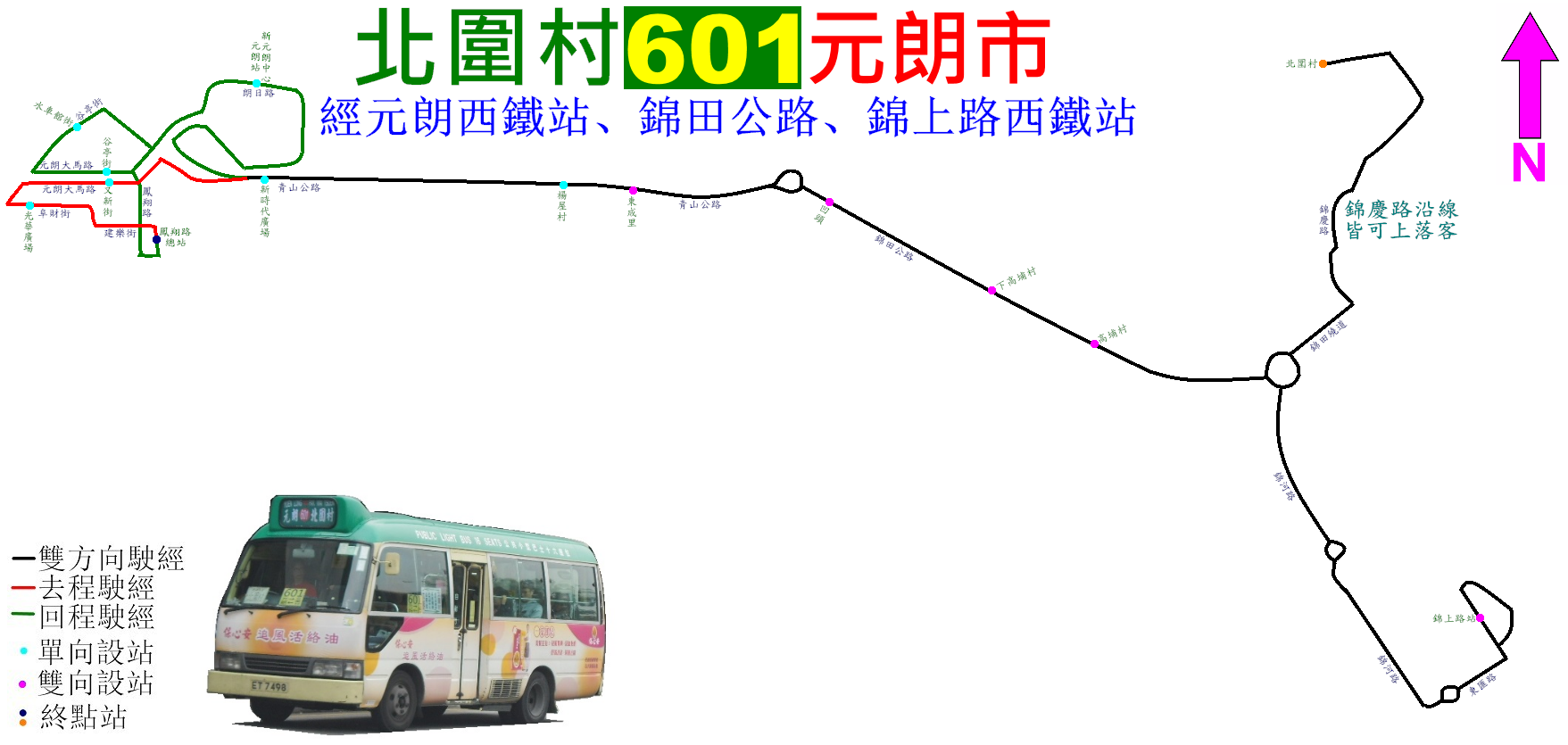 中文（香港）: 新界專線小巴601線的走線圖